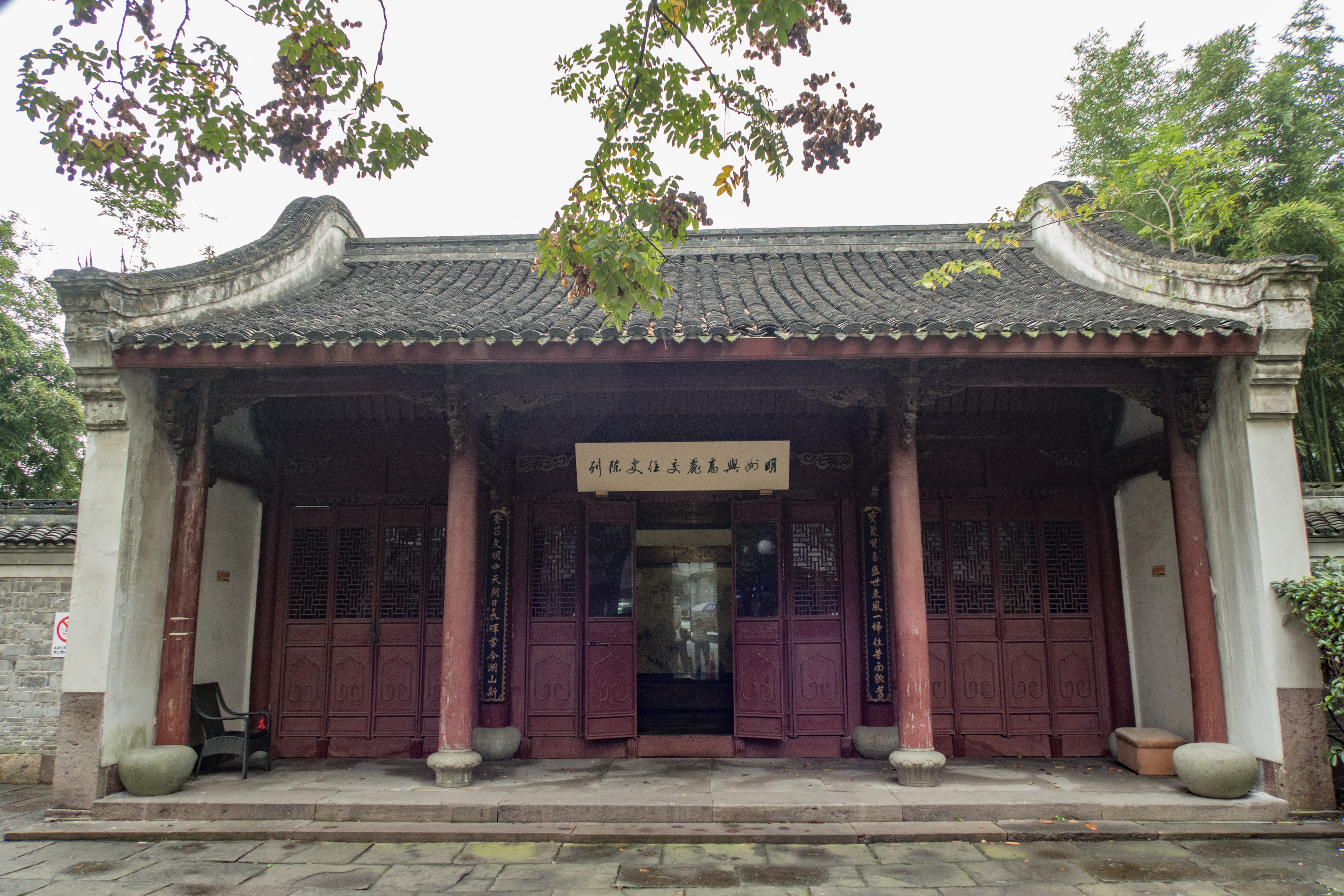 宁波高丽使馆遗址